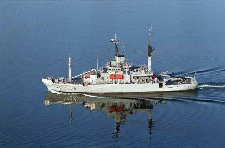 USS Salvor